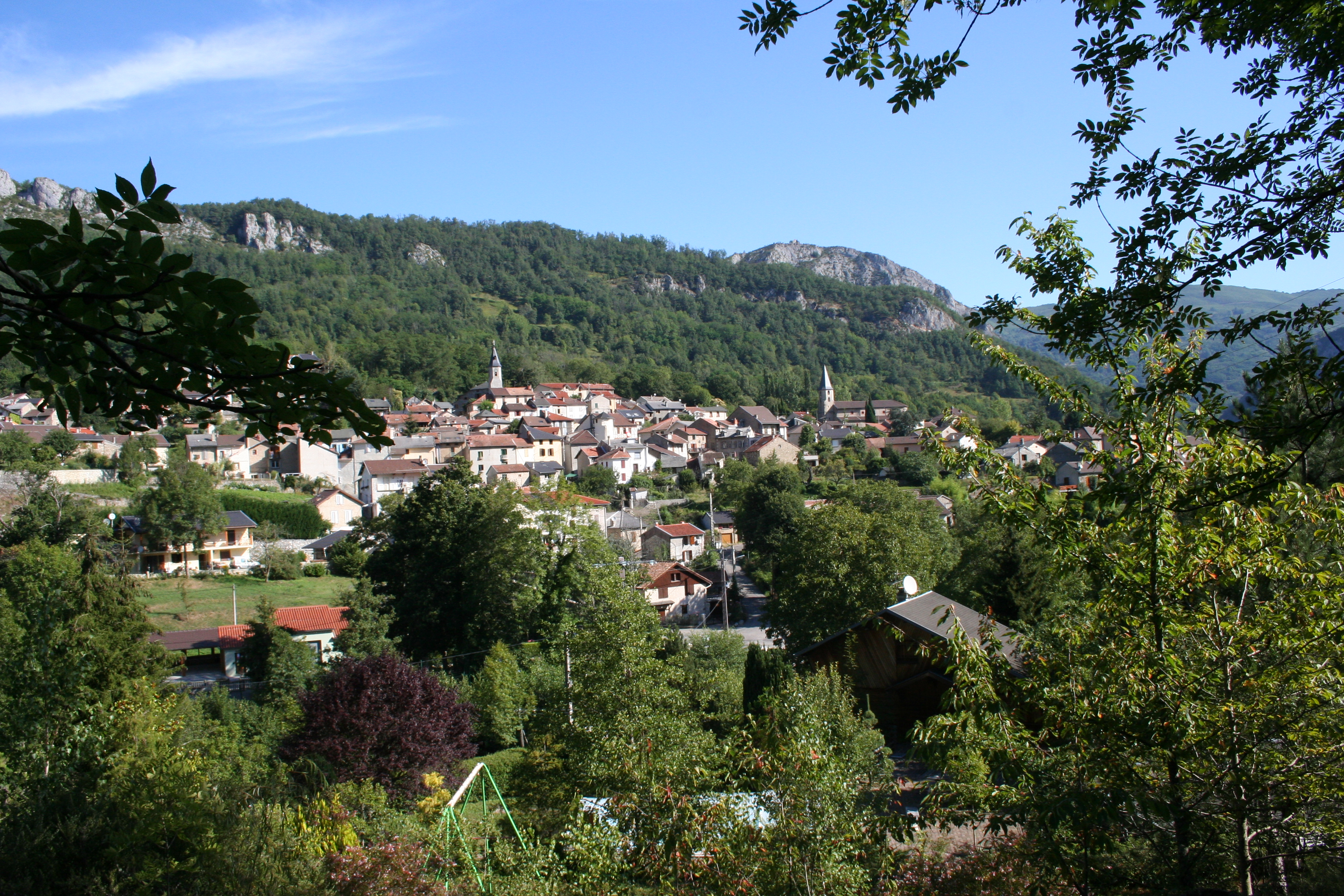 Vue de Rabat-les-Trois-Seigneurs prise du sentier menant à Gourbit.